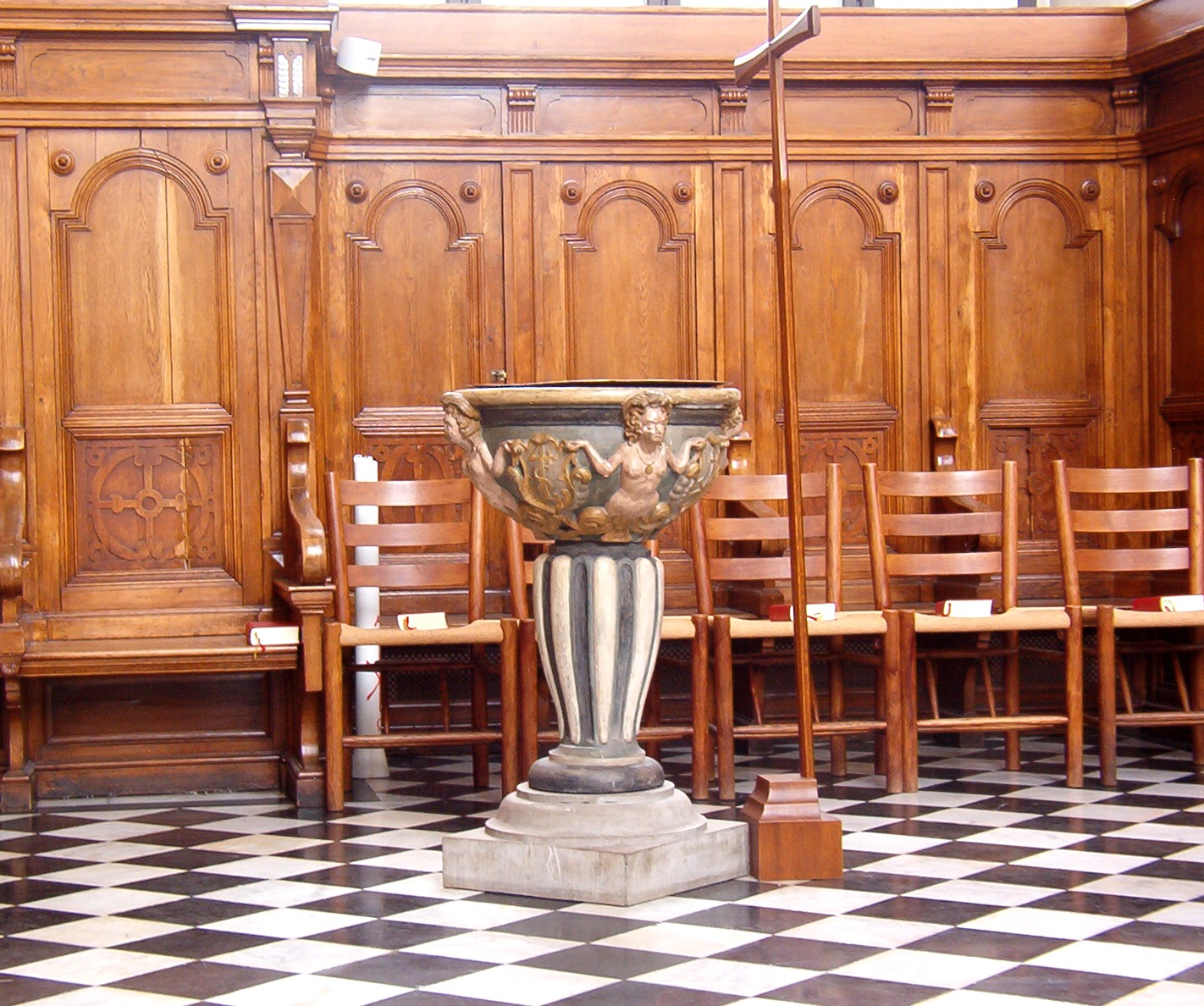 Date Aug. 2005